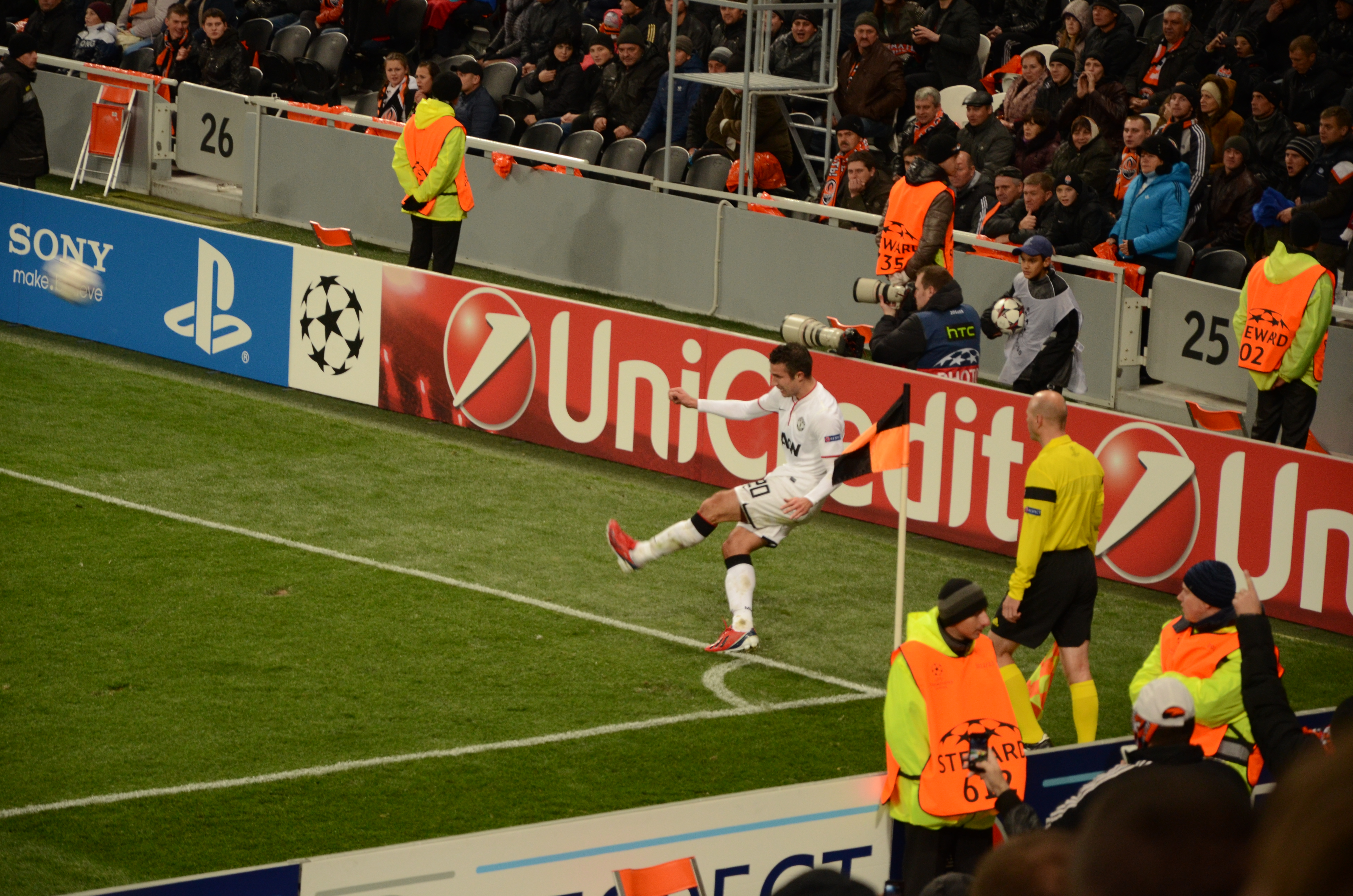 Robin_van_Persie1